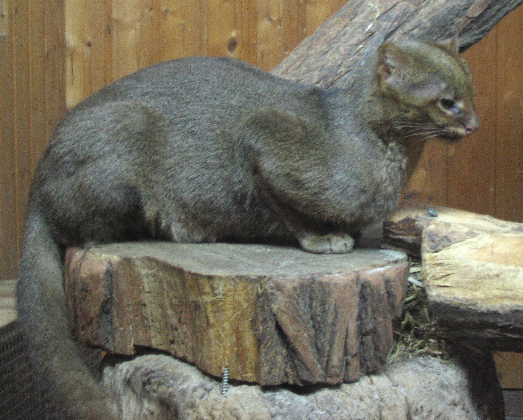 Jaguarundi fotografiert im Krefelder Zoo